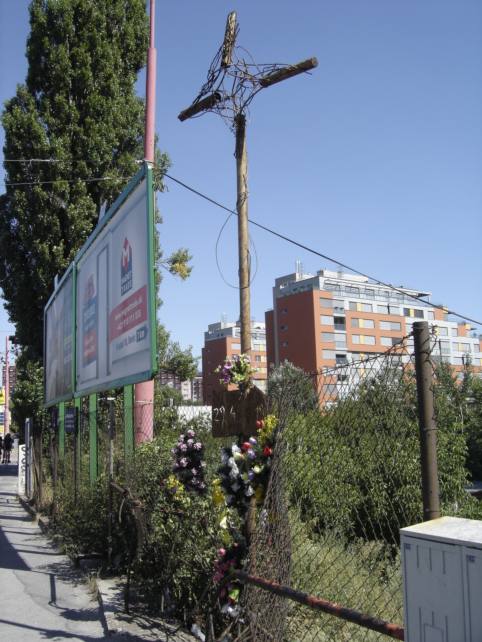 Miesto úmrtia Róberta Remiáša